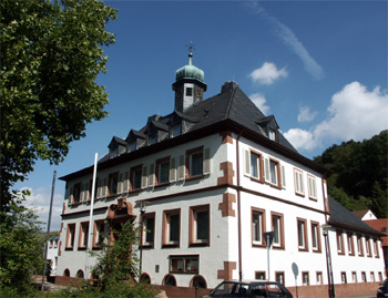 Rathaus (Ortsverwaltung)